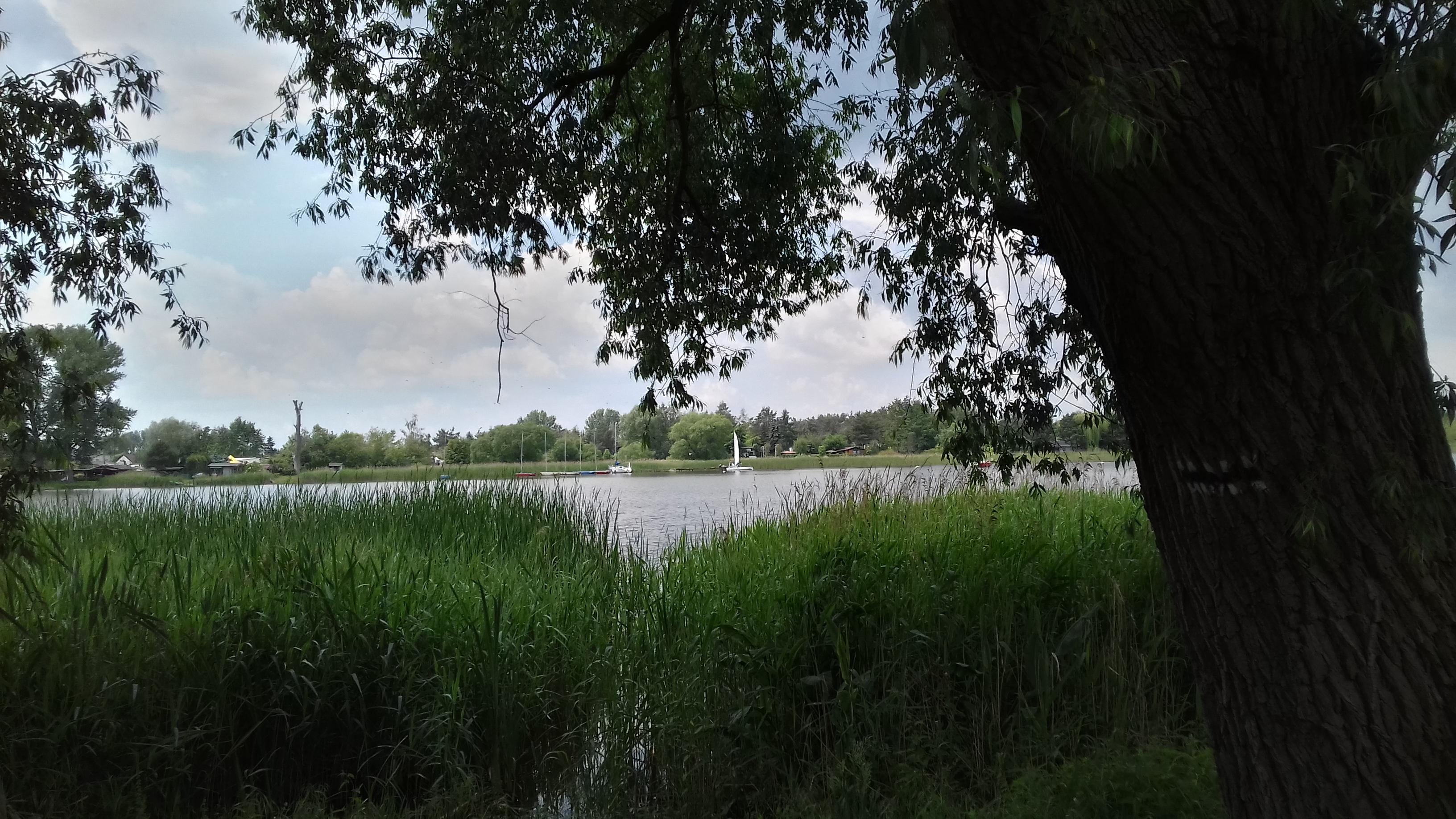 Przystań żeglarska w Dymaczewie, widok ze szlaku pieszego nr 3590.